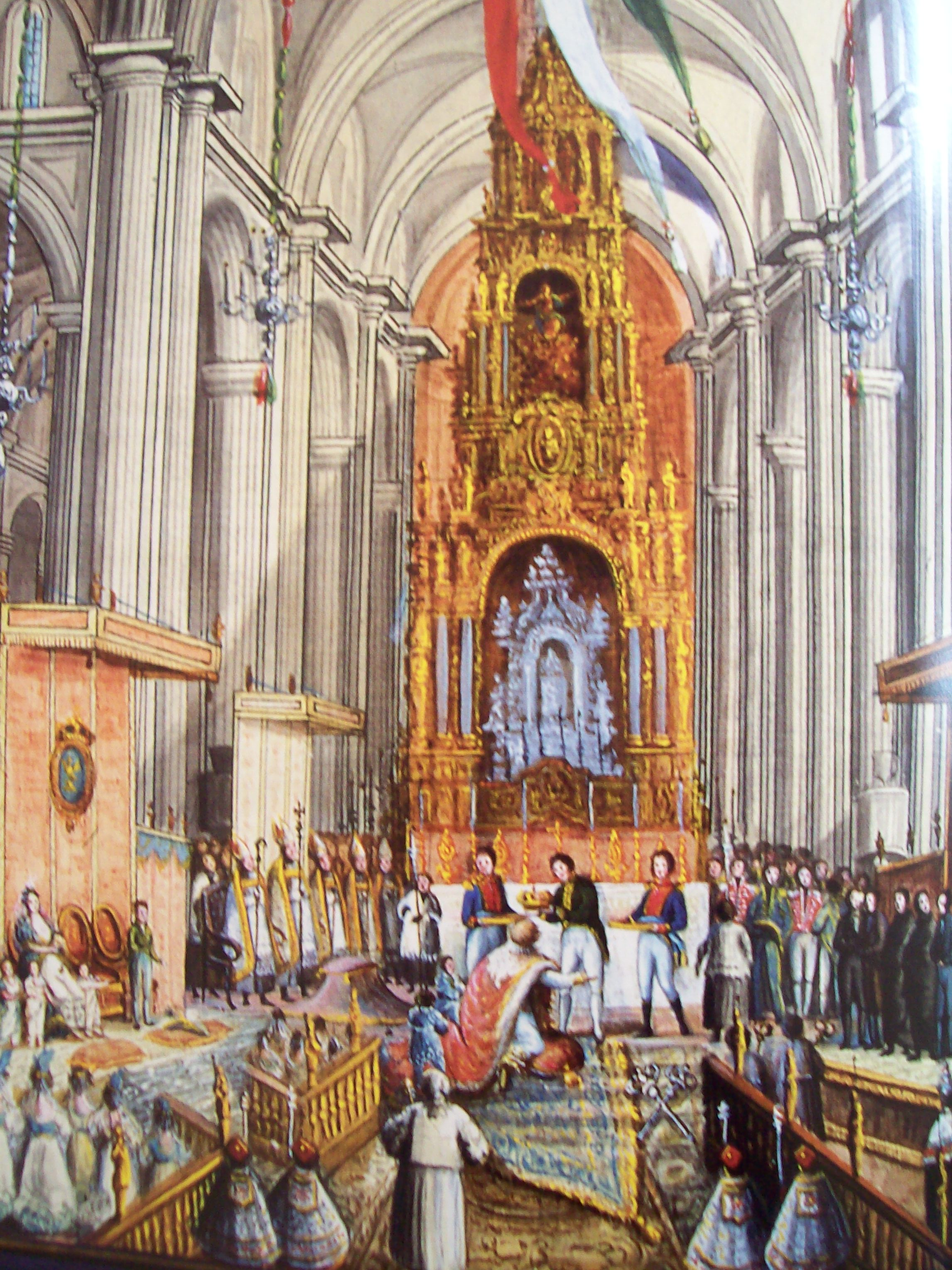 Solemne coronación de Iturbide en la Catedral de México. Día 21 de julio de 1822. Aguafuerte, Museo Nacional de Historia. INAH México.